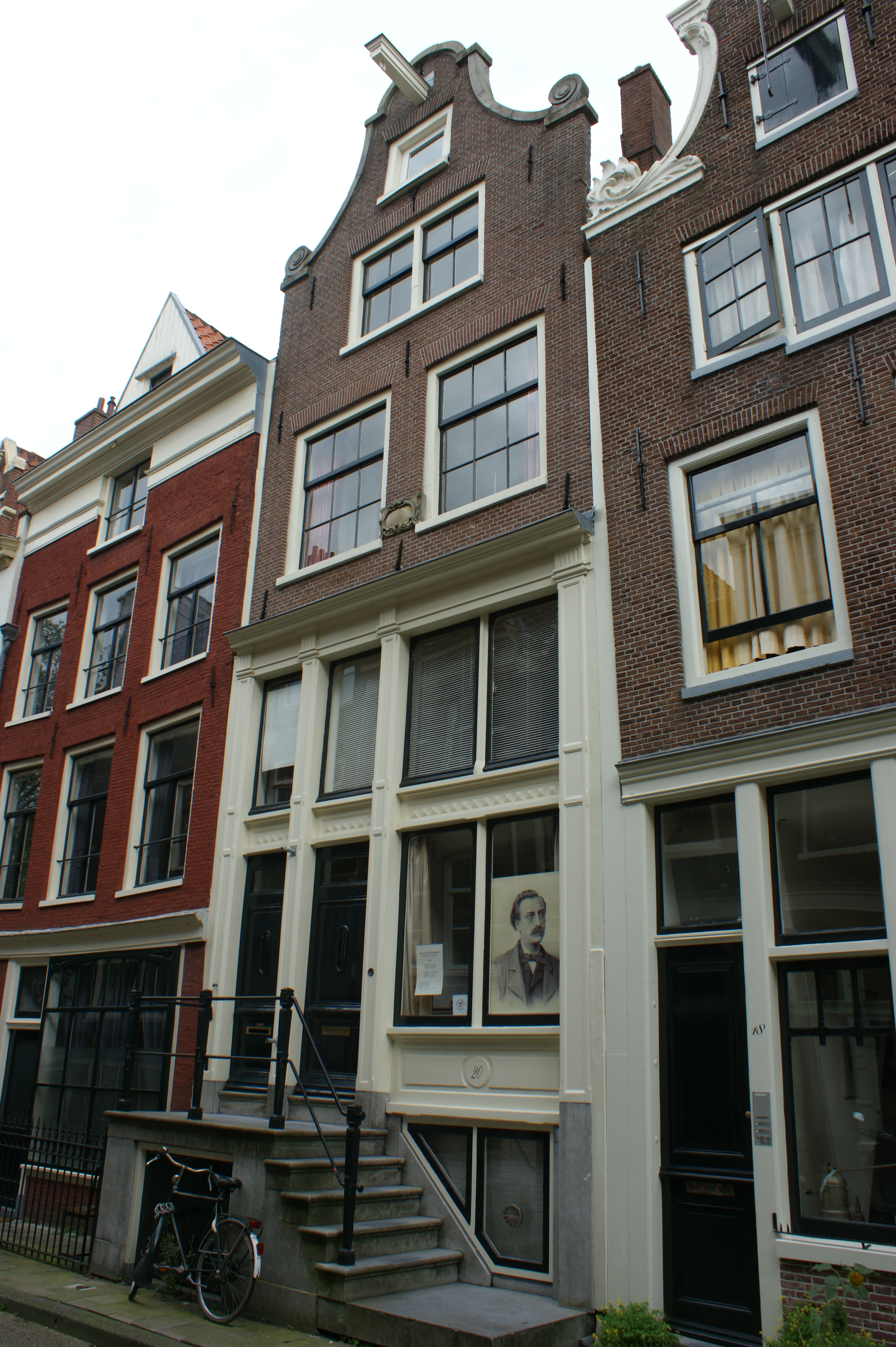 Amsterdam, Korsjespoortsteeg